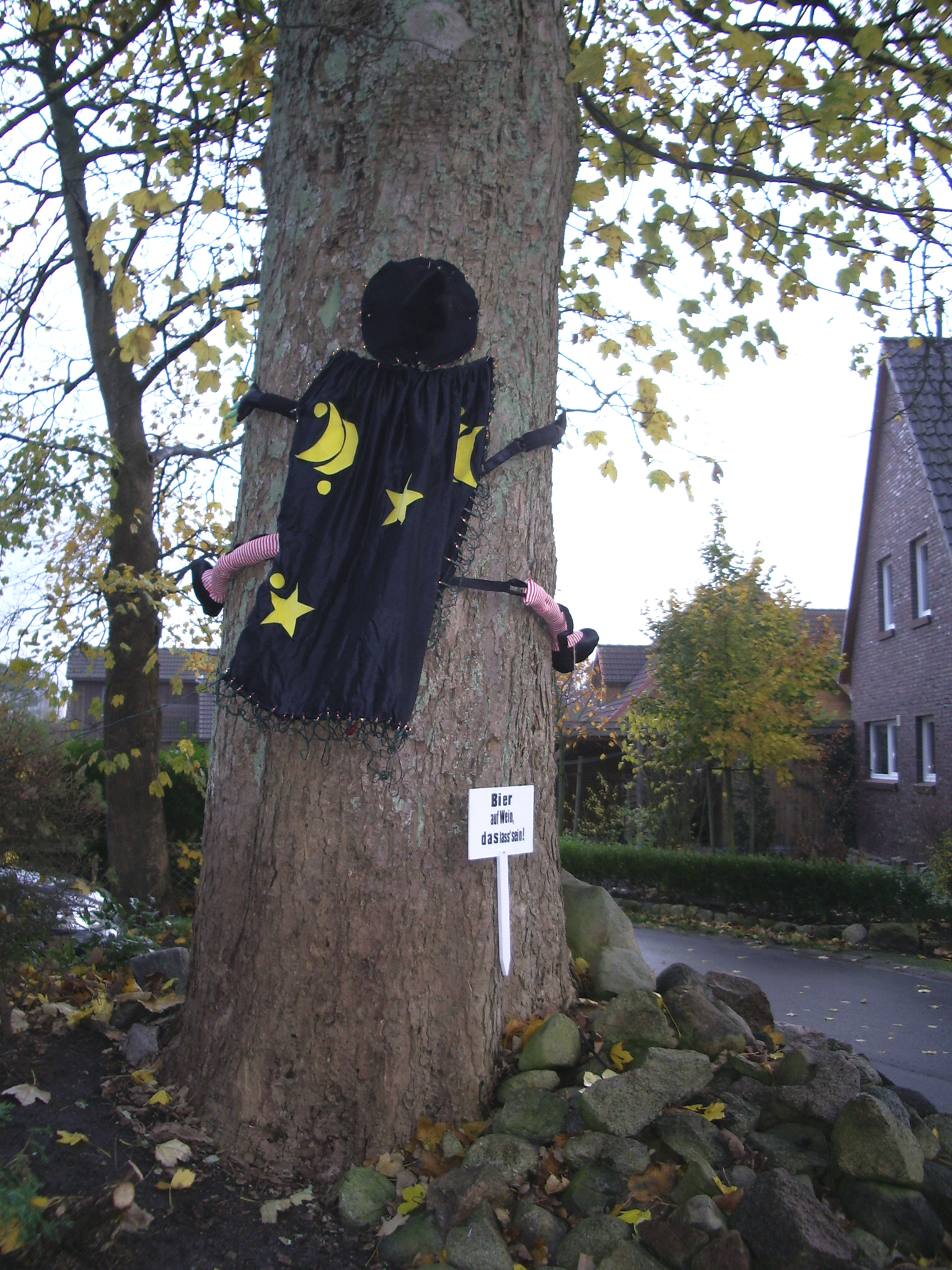 Gesehen in Hetlingen (Kreis Pinneberg), Halloween 2008